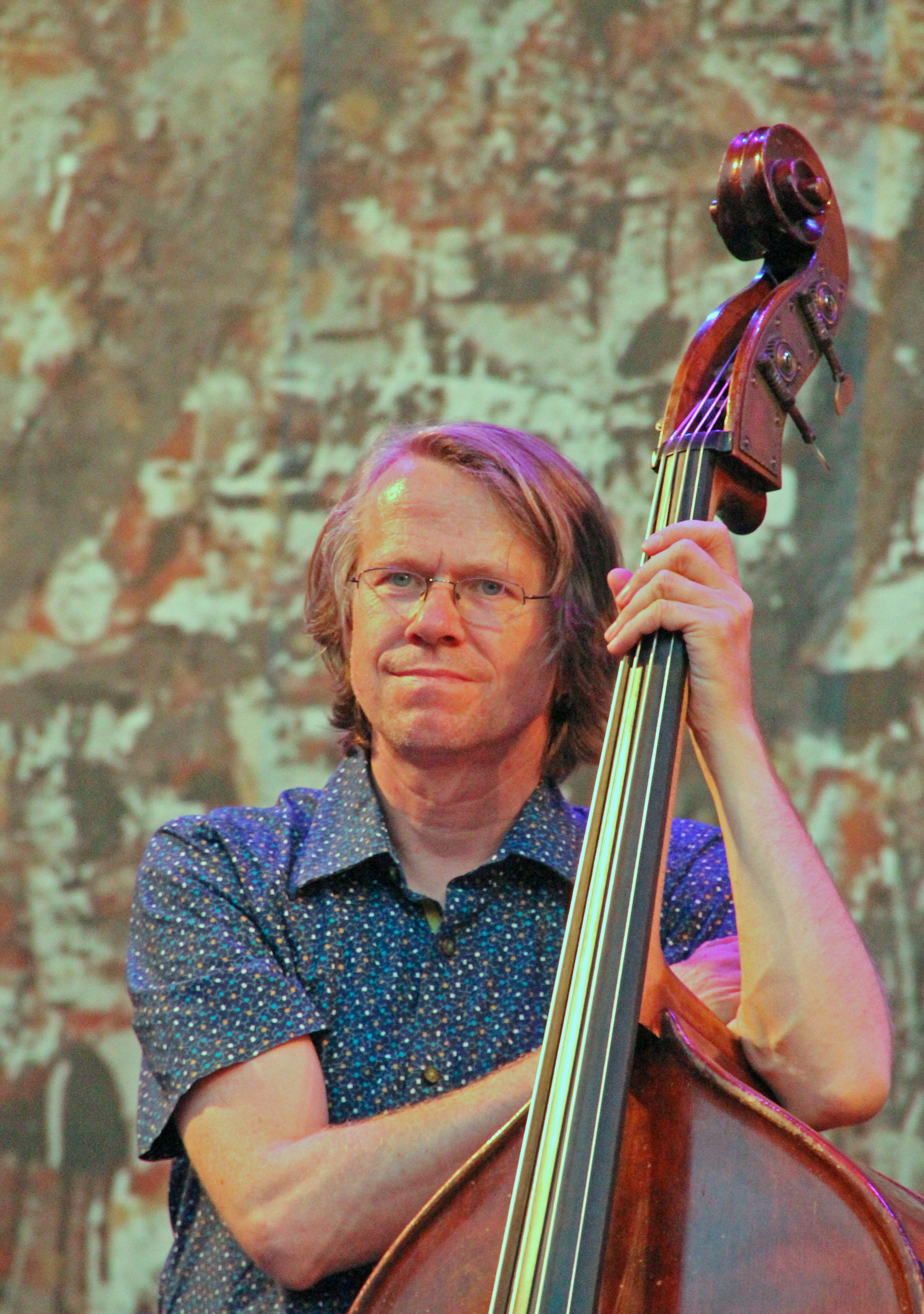 Bildinhalt: Henning Sieverts bei einem Auftritt mit dem Adam-Pierończyk-Quartett im Palmengarten Aufnahmeort: Frankfurt am Main, Deutschland Die dargestellte Person wurde bei einem öffentlichen Auftritt fotografiert.